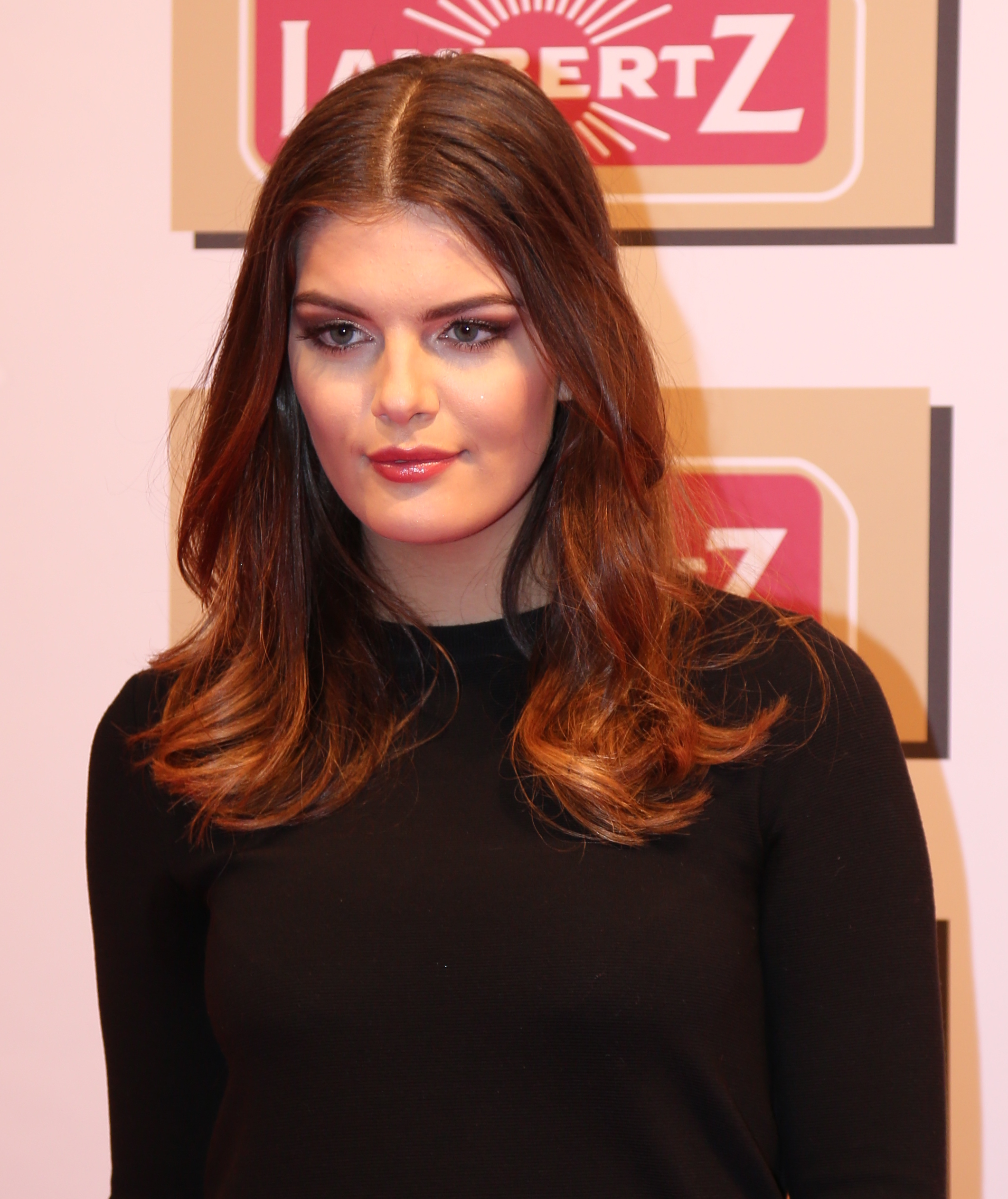 Vanessa Fuchs bei der Lambertz Monday Night 2017.